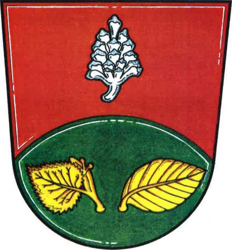 Záboří (CB), znak. V červeno-zeleně do oblouku děleném štítě nahoře vztyčená stříbrná borová šiška, dole dva odvrácené listy, vpravo lipový s listenem o dvou plodech, vlevo bukový, vše zlaté.